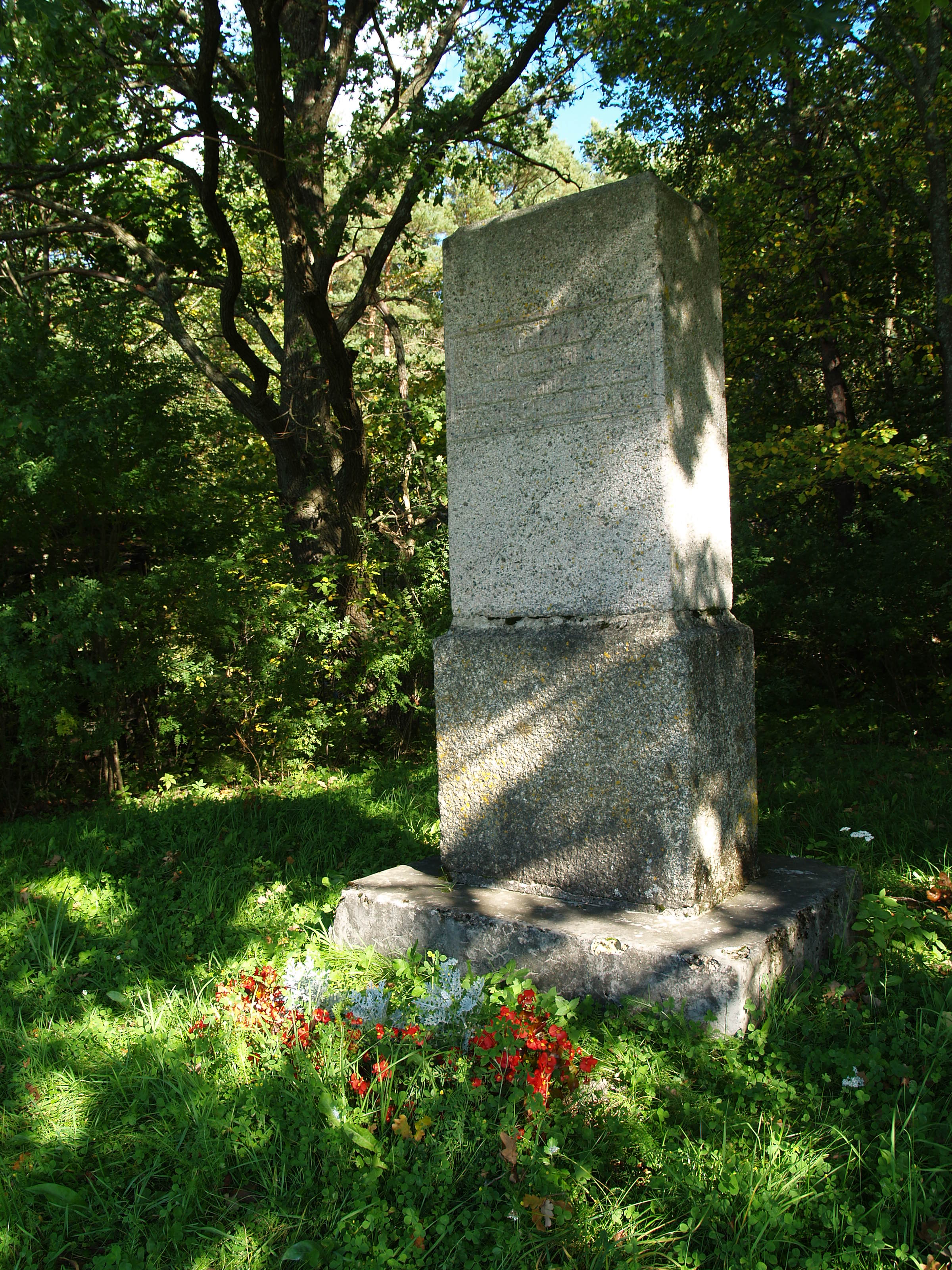 Vabadussõja Reola lahingu mälestussammas. Mälestussambal on tekst: "Kodanik! Siin, Reola väljadel murdsime vaenlase ülivõimu 16.-17. jaan 1919." Sammas asub Haaslava ja Kambja valla piiri ligidal.